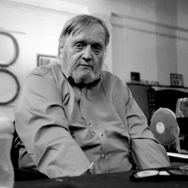 Jan Henderikse in zijn Antwerps atelier